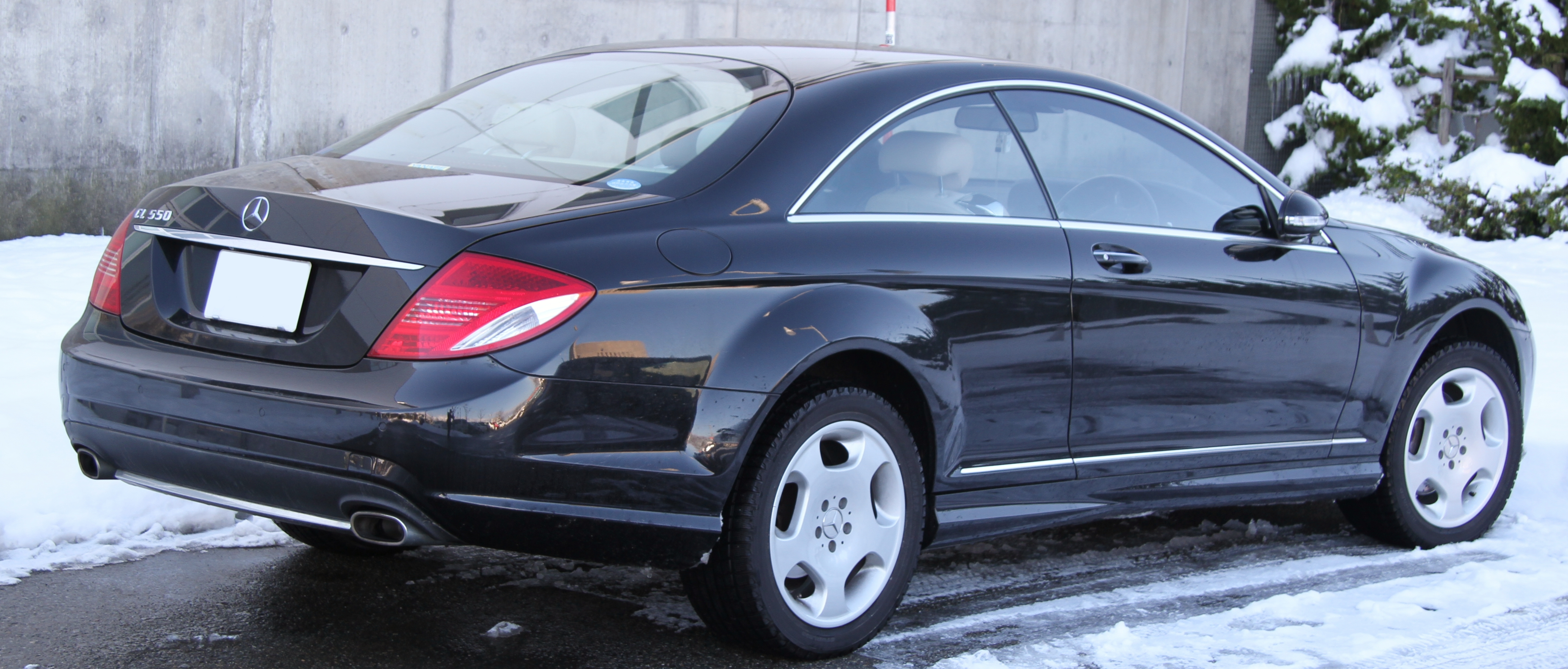 Mercedes-Benz CL-Class